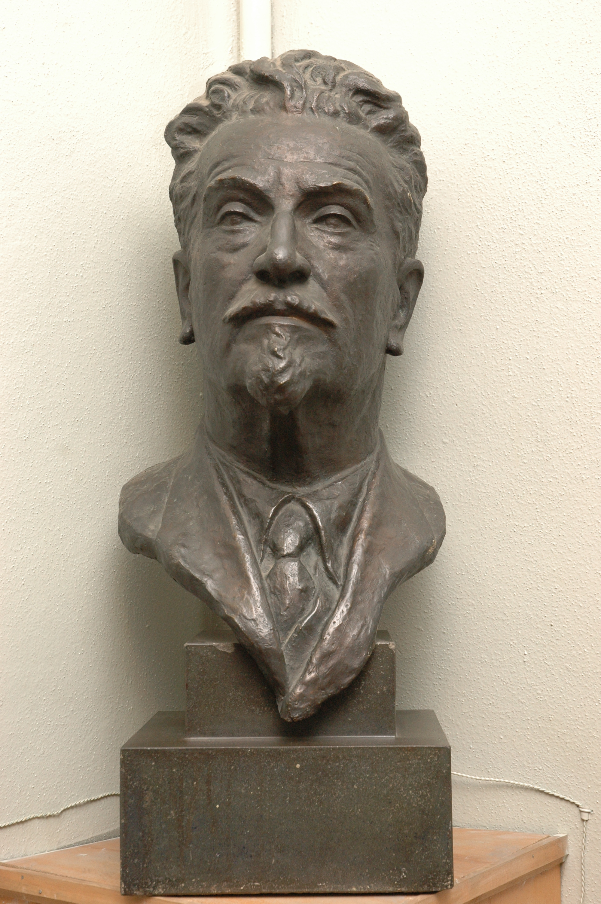 Ալեքսանդր Ջիվելեգով